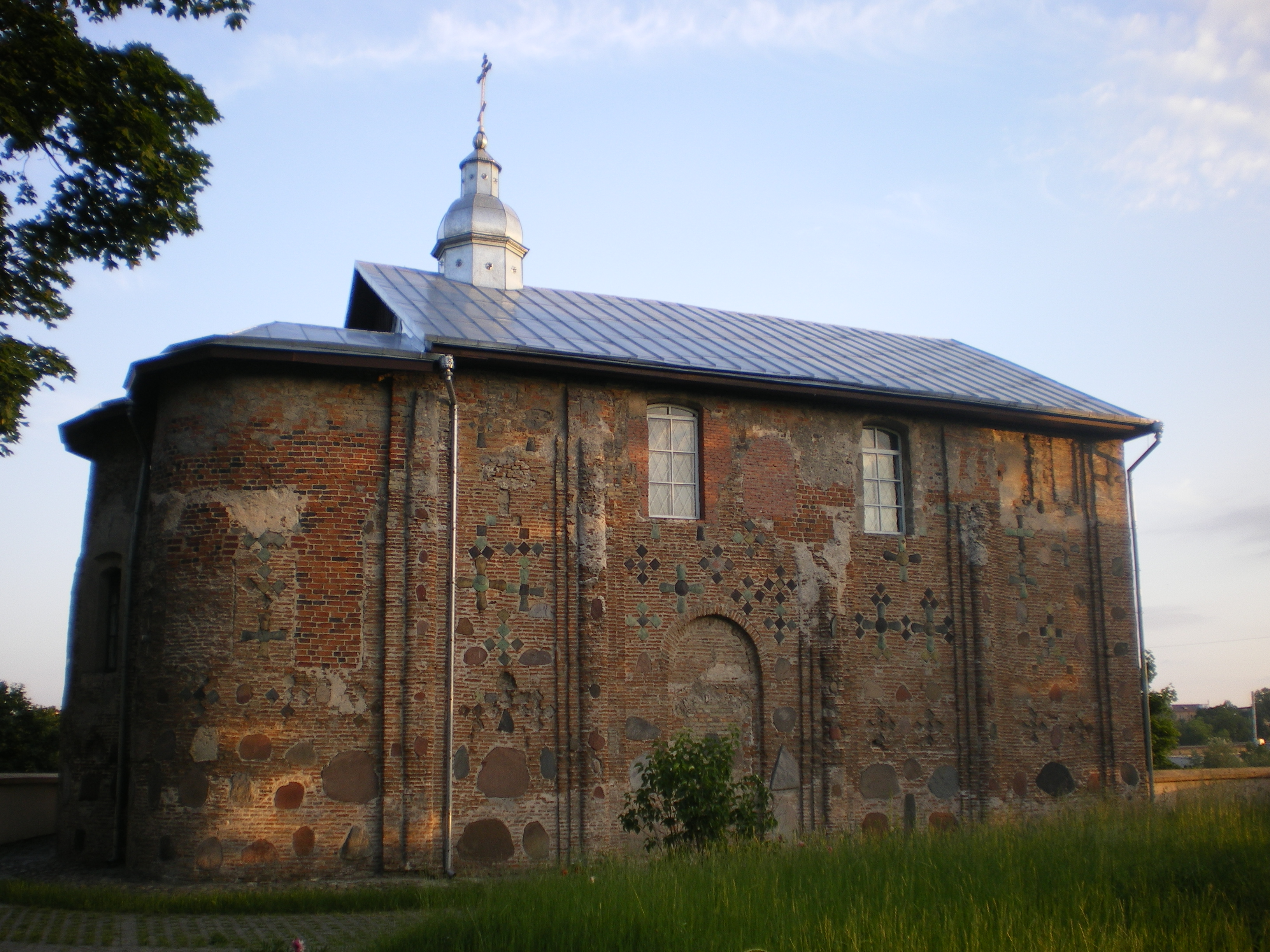 Klasztor i cerkiew "Kołoża" w Grodnie